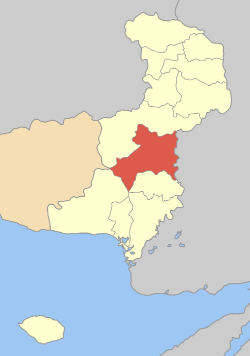 Дем Софлу на картата на Ном Еврос, Гърция. Locator map of Soufli municipality (Δήμος Σουφλίου) in Evros prefecture (Νομός Έβρου) in Greece.